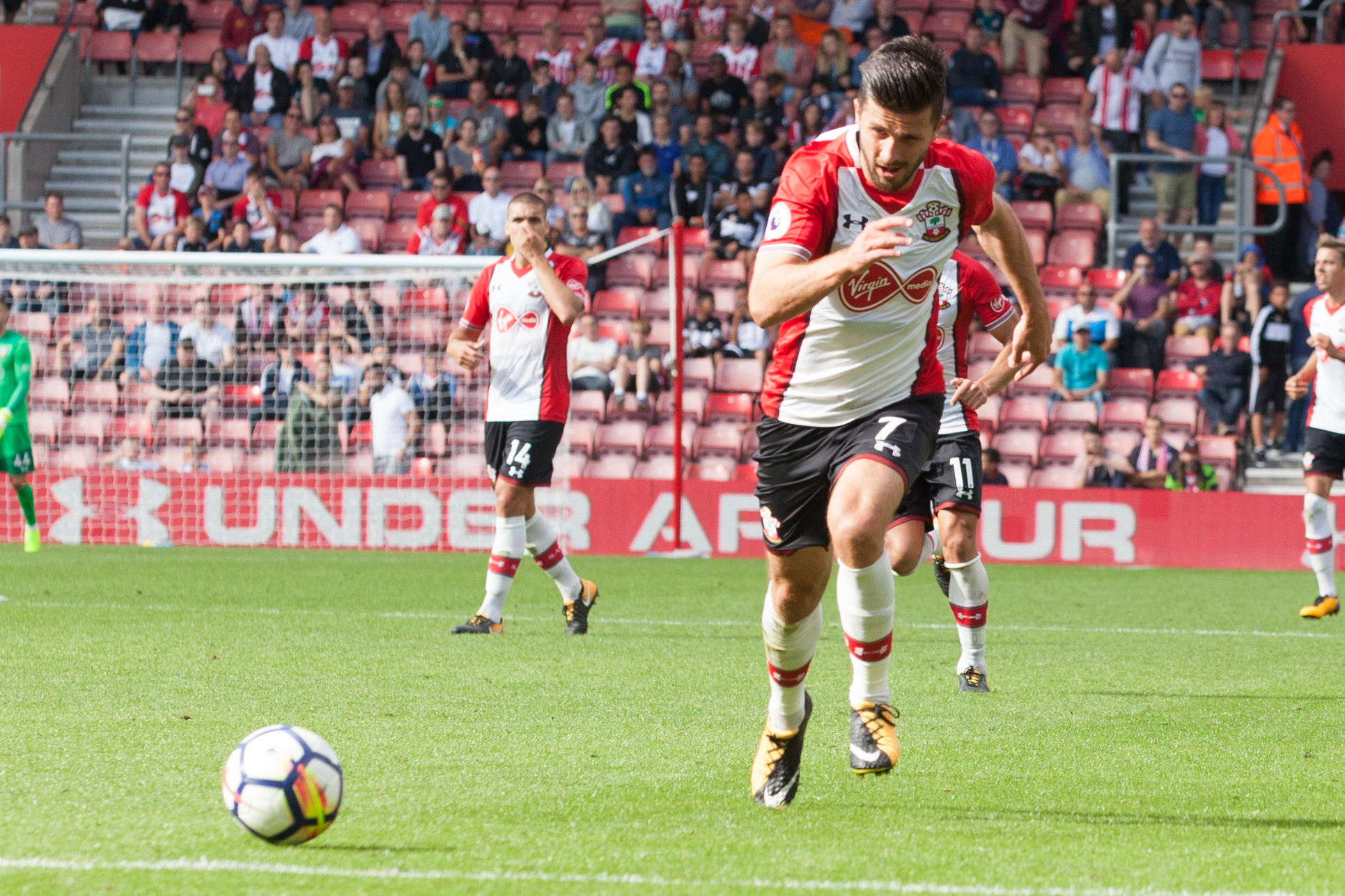 Image by Steve Hogg